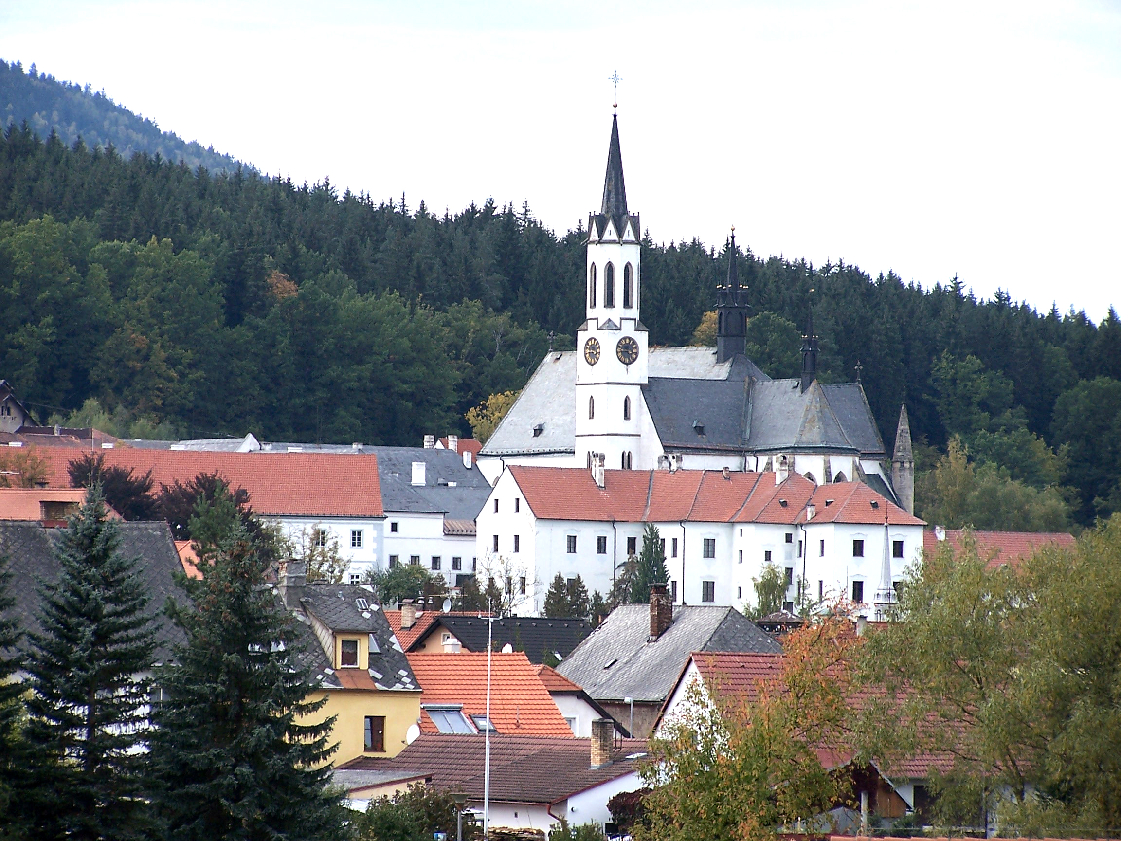 Česky: Město Vyšší Brod s jeho dominantou, cisterciáckým klášterem